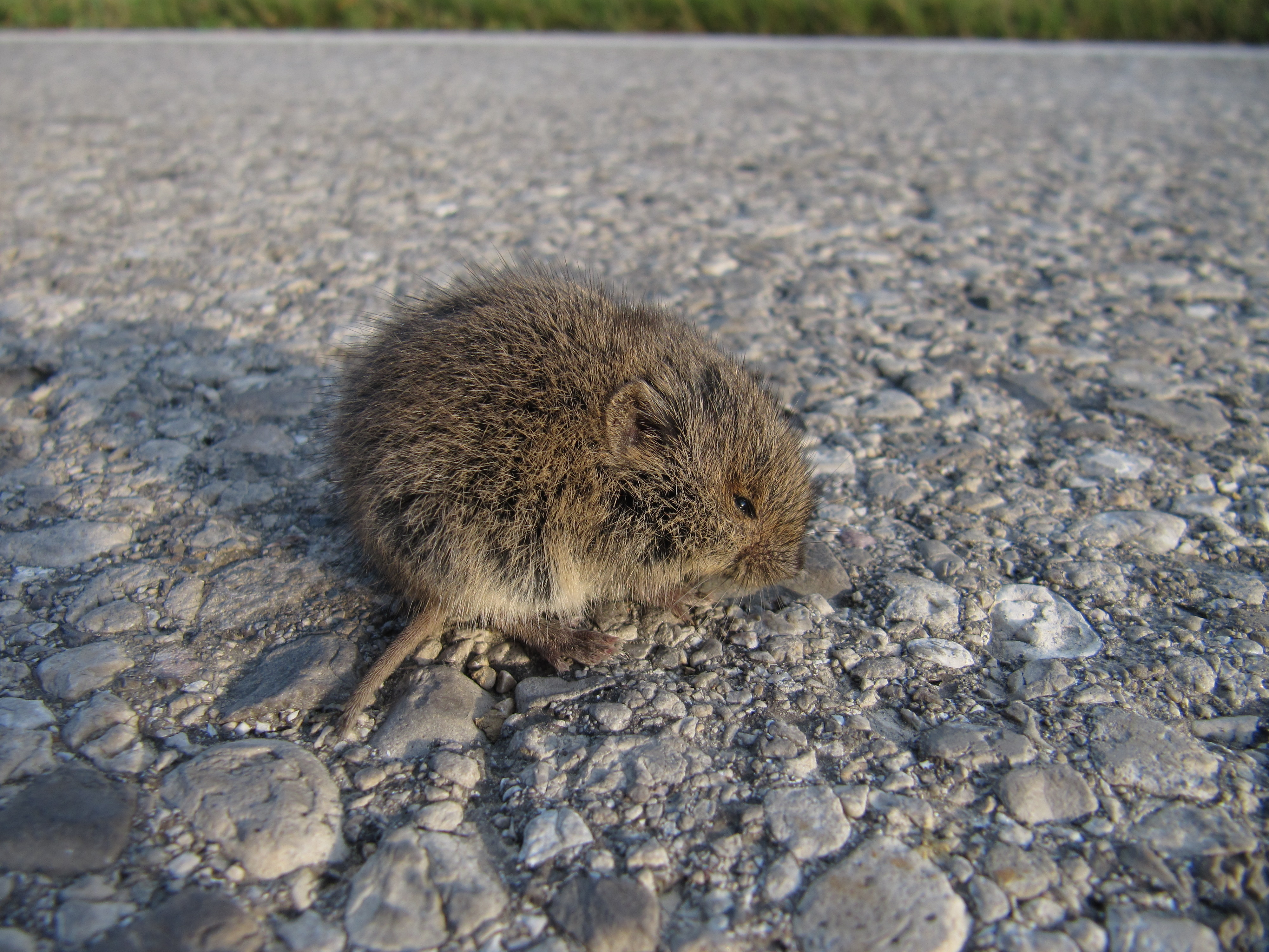 Eine Feldmaus Microtus arvalis verfällt in Angststarre bei der Hohen Wand.